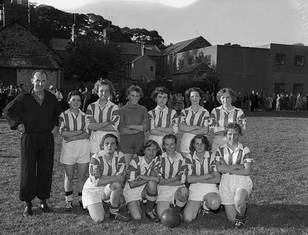 Teitl Cymraeg/Welsh title:Gêm bêl-droed Merched Porthaethwy yn erbyn Penrhos Ffotograffydd/Photographer: Geoff Charles (1909-2002) Dyddiad/Date:Mehefin/ June 25, 1959 Cyfrwng/Medium: Negydd ffilm / Film negative Cyfeiriad/Reference: (gch20527) Rhif cofnod / Record no.: 3470302 Rhagor o wybodaeth am gasgliad Geoff Charles yn Llyfrgell Genedlaethol Cymru More information about the Geoff Charles Collection at the National Library of Wales Mae ffotograffau Geoff Charles hefyd yn rhan o Broject Europeana Libraries Geoff Charles' photographs also form part of the Europeana Libraries Project vv